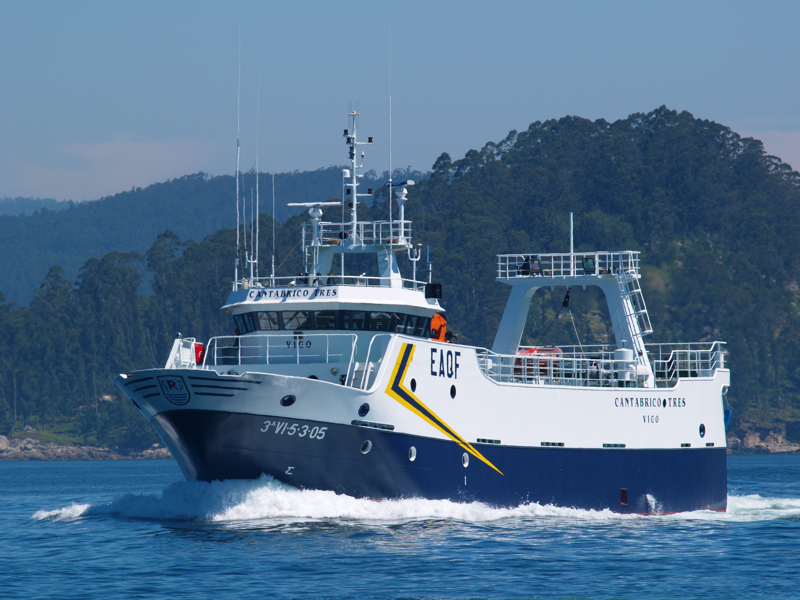 BC 2 PESQUERO ARRASTRERO 02